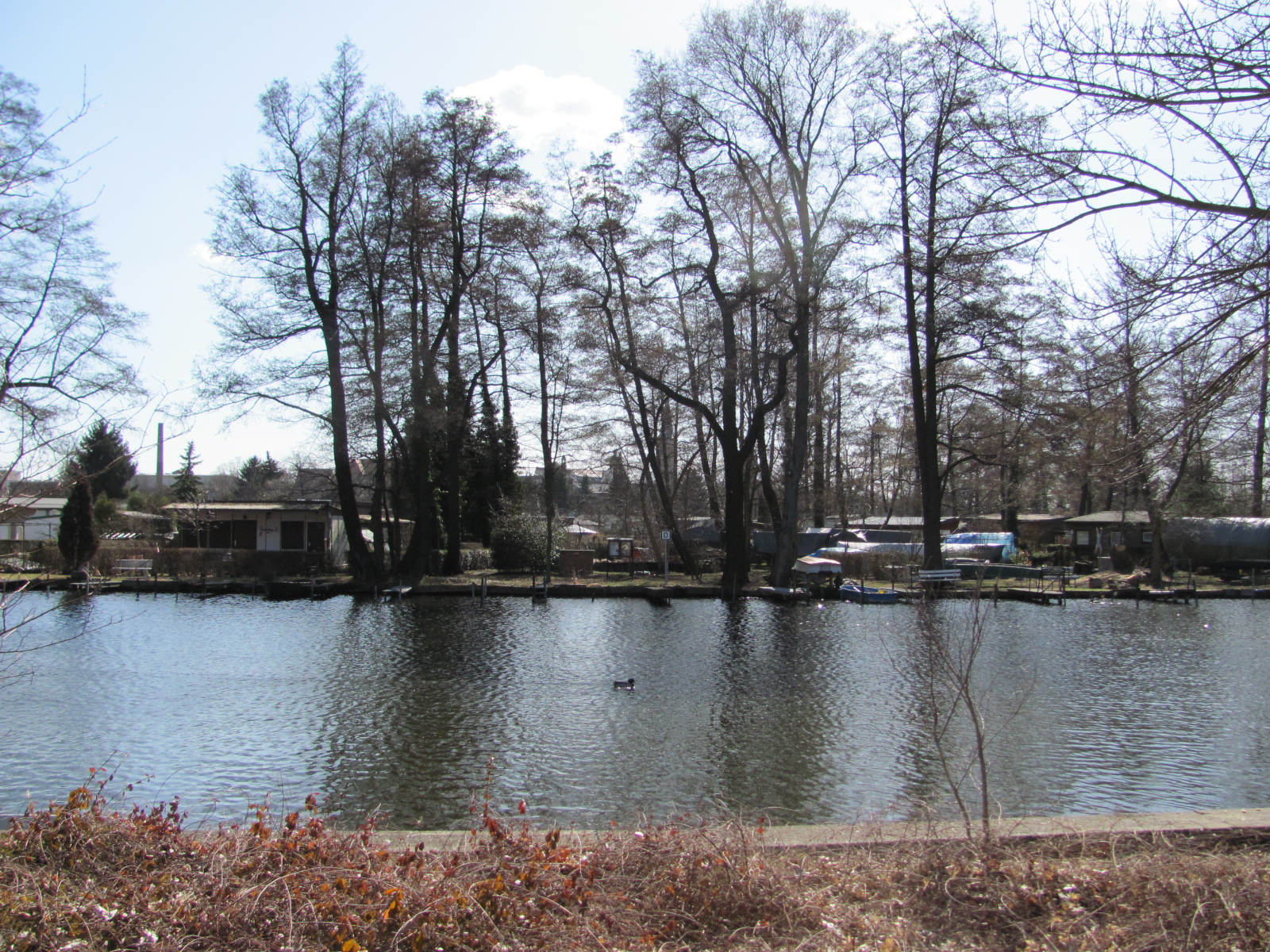 Alte-Spree at Berlin-Köpenick, showing Baumgarteninsel.